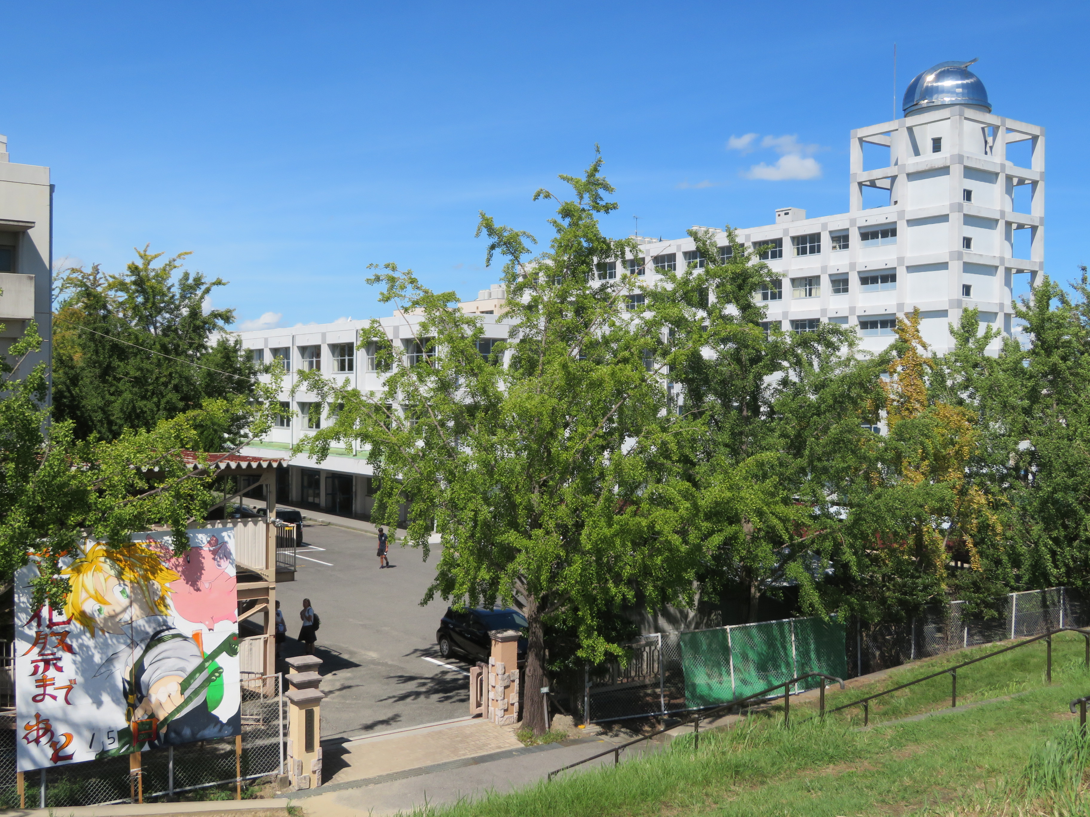 岡崎城西高等学校（愛知県岡崎市中園町）